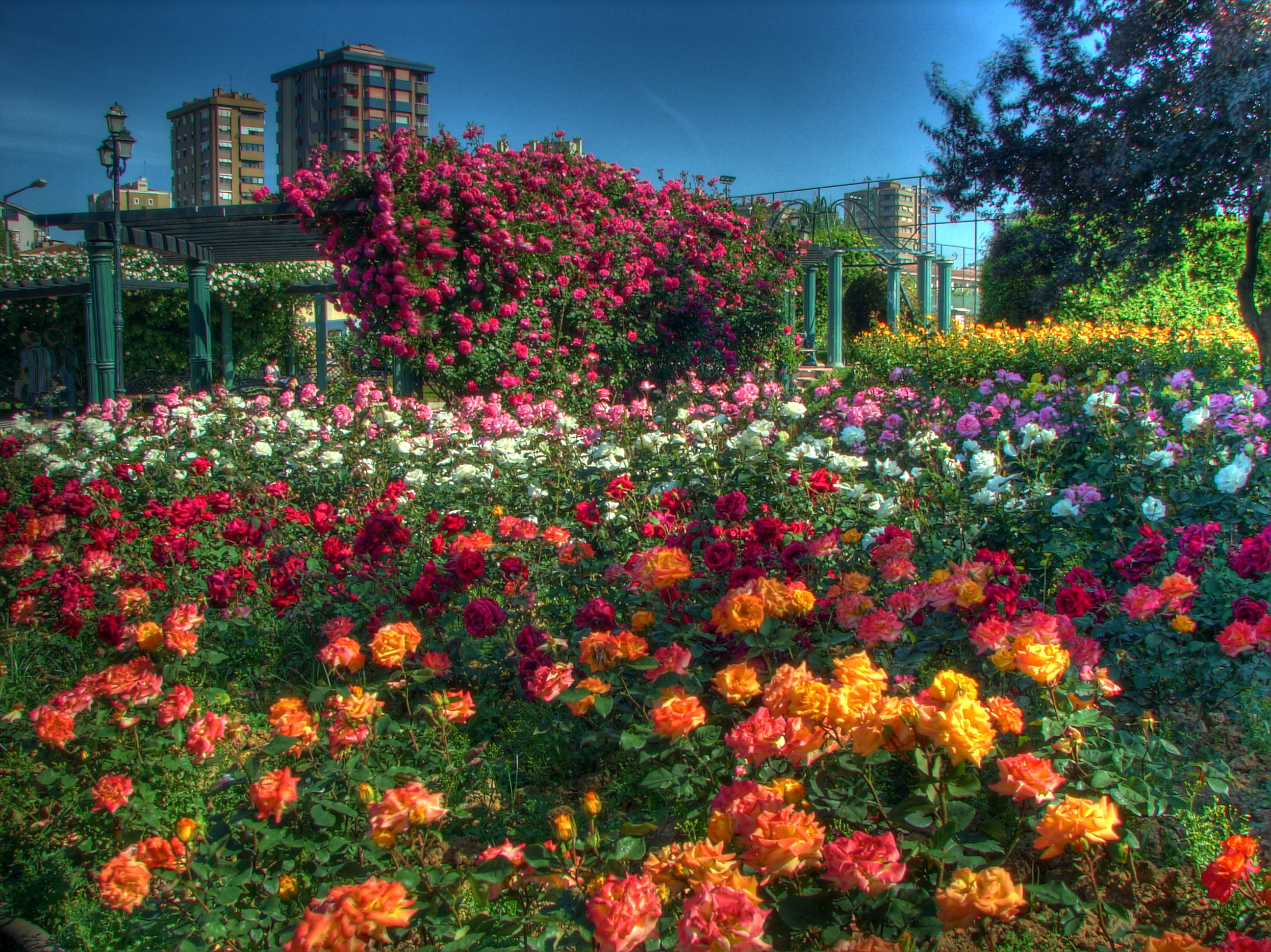 Göztepe Park, Istanbul, HDR image